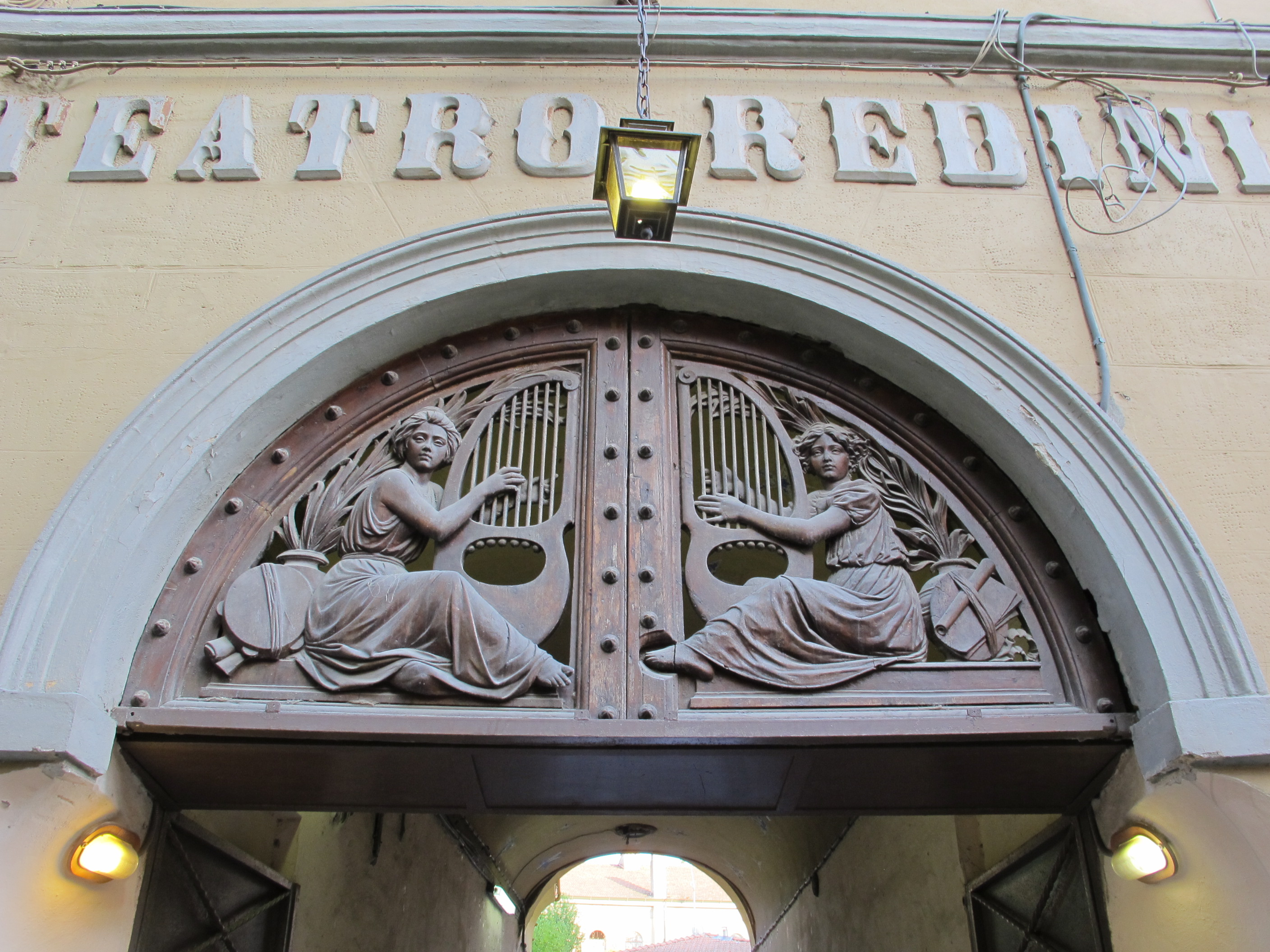 Pisa, antico teatro redini